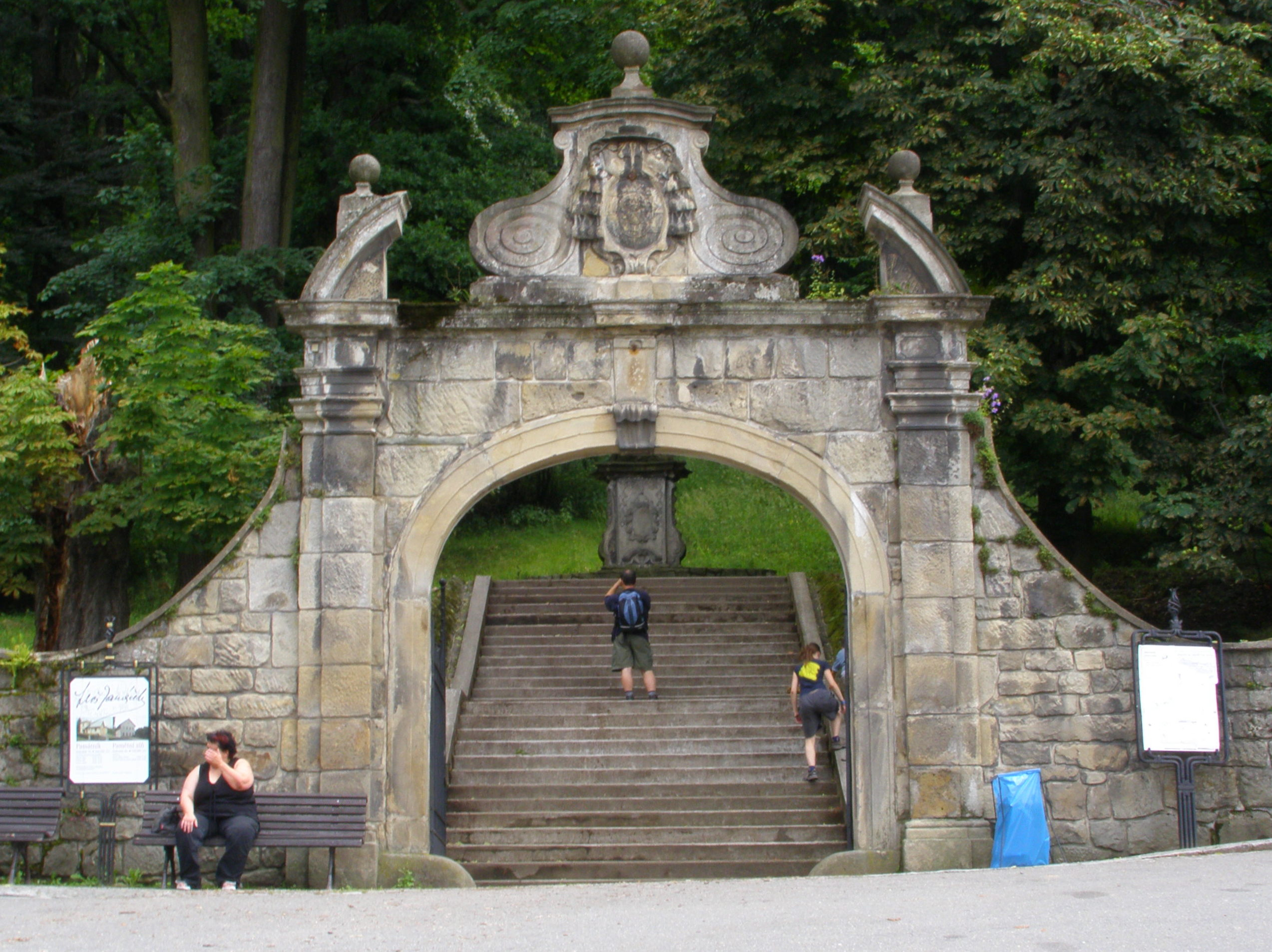 Hukvaldy, brána do obory